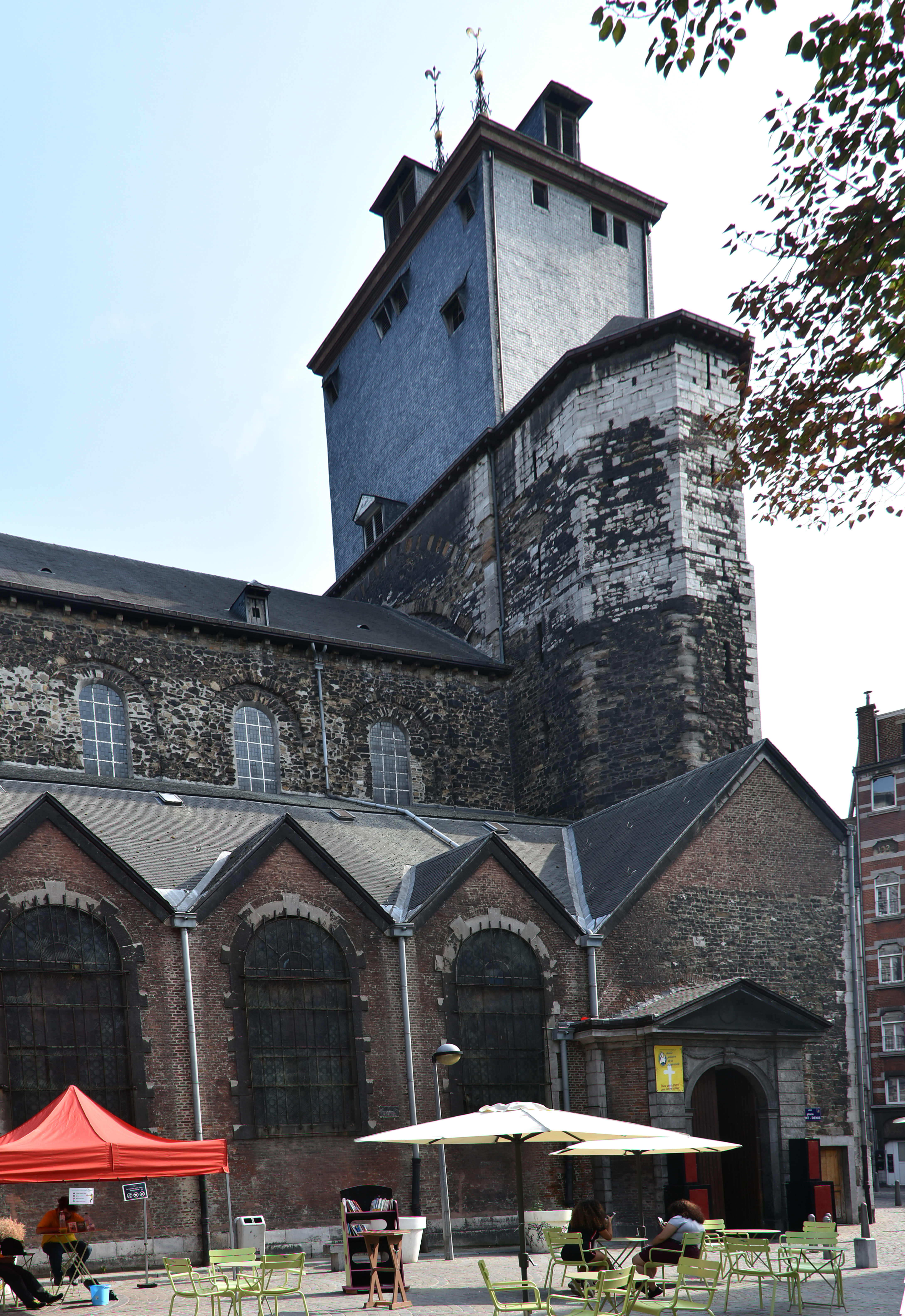 Sint-Denijskerk (Luik) 23-08-2018 This photo of immovable heritage has been taken in the Walloon Region